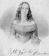 Amalie Struve; Stadtarchiv Mannheim – ISG, Bildsammlung AB01612; wife of Gustav Struve